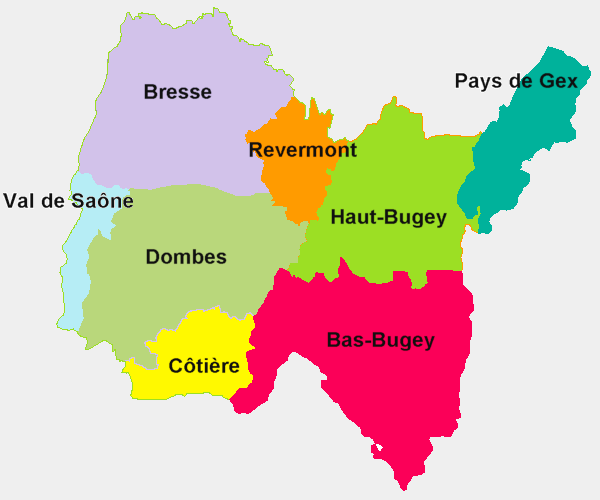 Situation relatives et approximatives des régions naturelles de l'Ain, au sein du département.